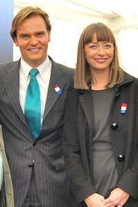 TVN inaugura centro regional en Talcahuano